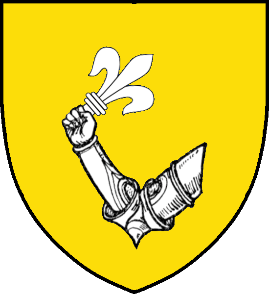 Vapensköld för svenska adelsätten Ille nr 60